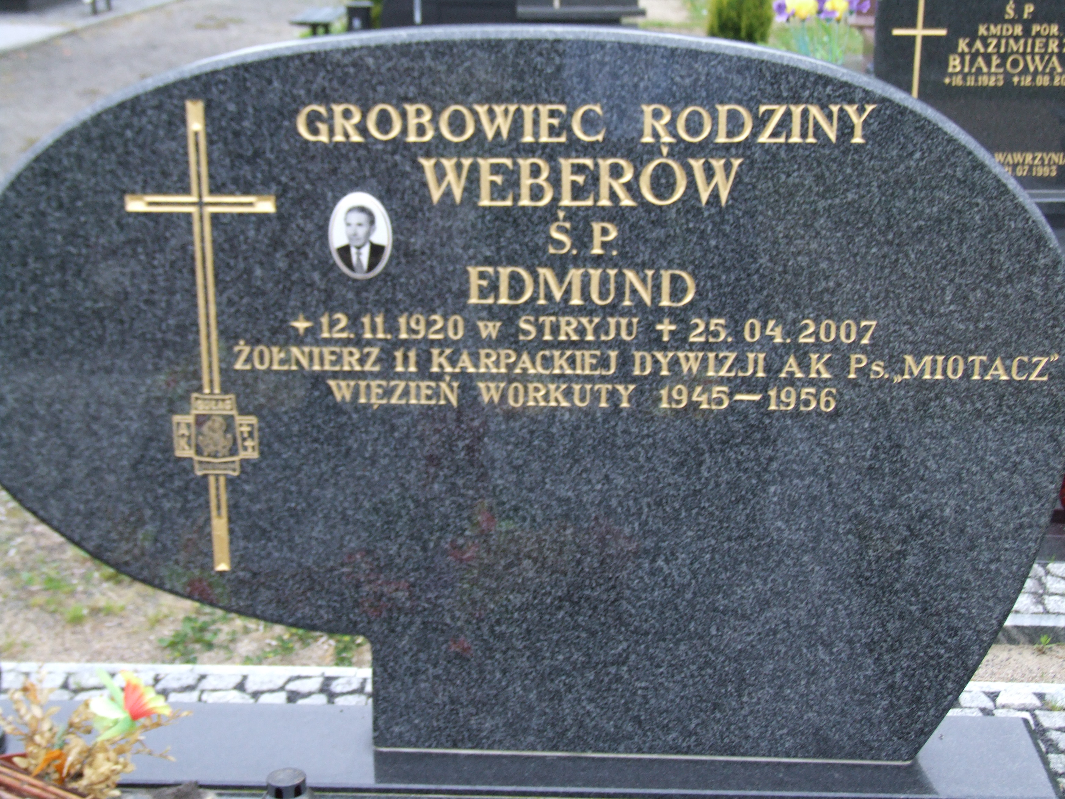 Gdynia-Oksywie Cmentarz Marynarki Wojennej